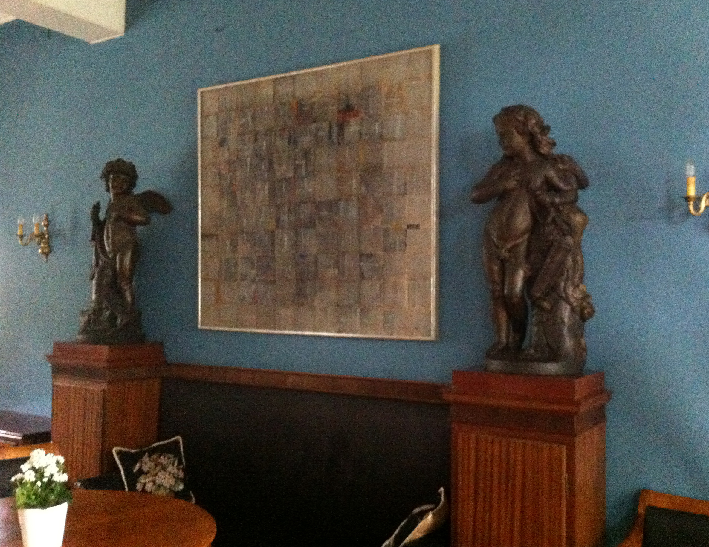 Interiør fra peisestuen, første etasje, i hovedbygningen på Lerchendal gård. Maleriet over sofaen er av Halvdan Ljøsne